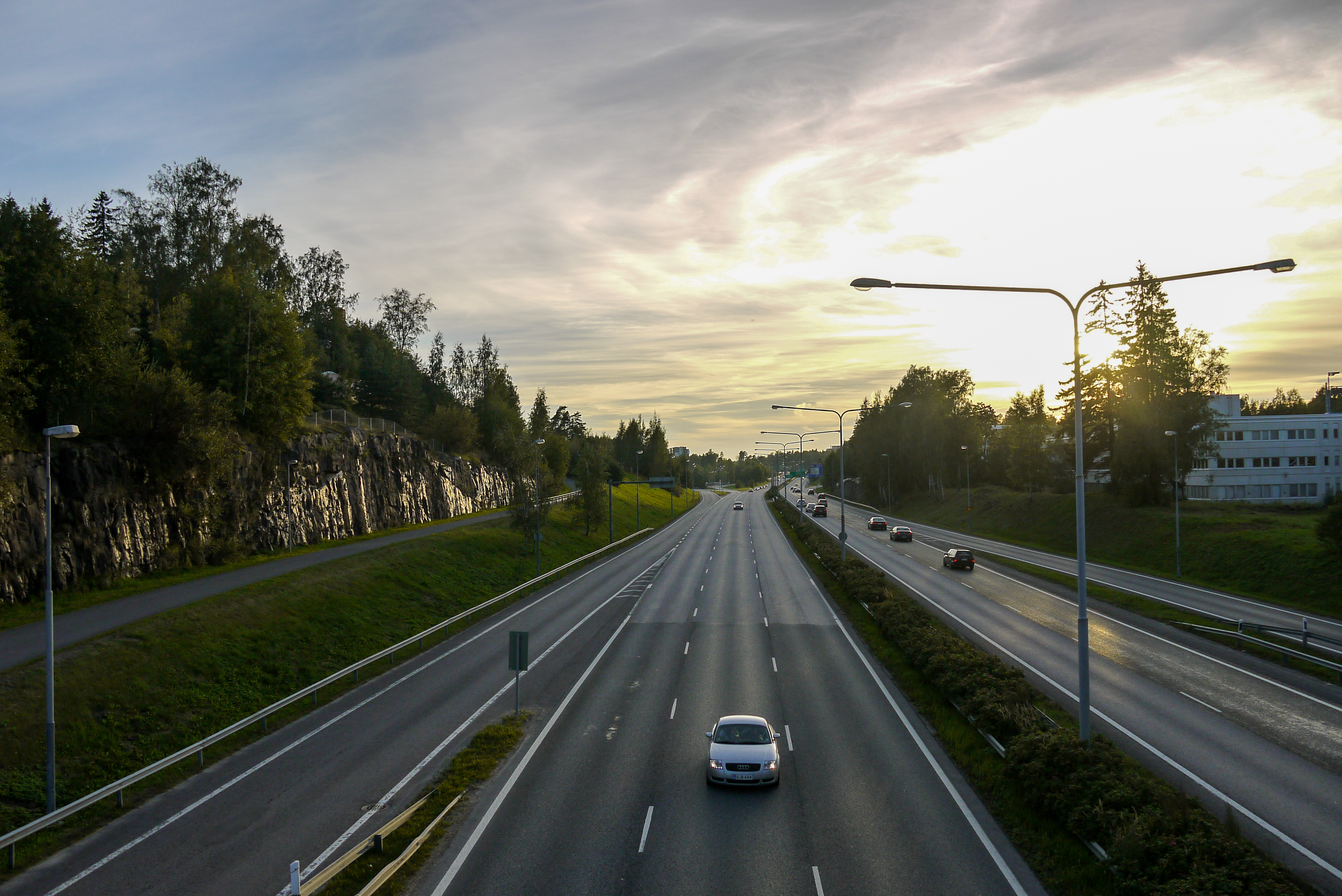 Länsiväylää Haukilahdensolmun kohdalta. Kuva otettu länteen.